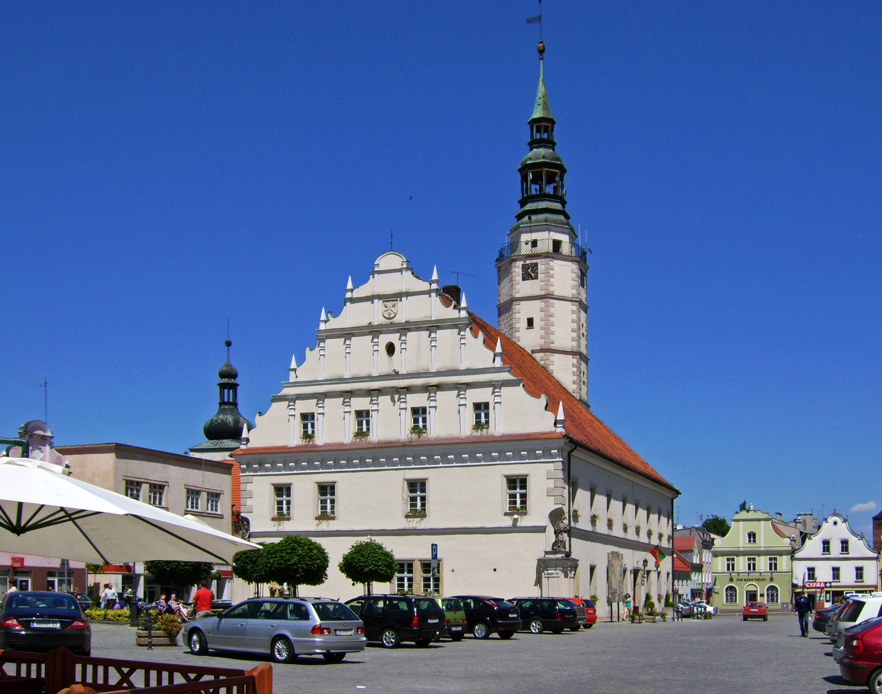 Ratusz. (zabytek nr rejestr. A/117/54)